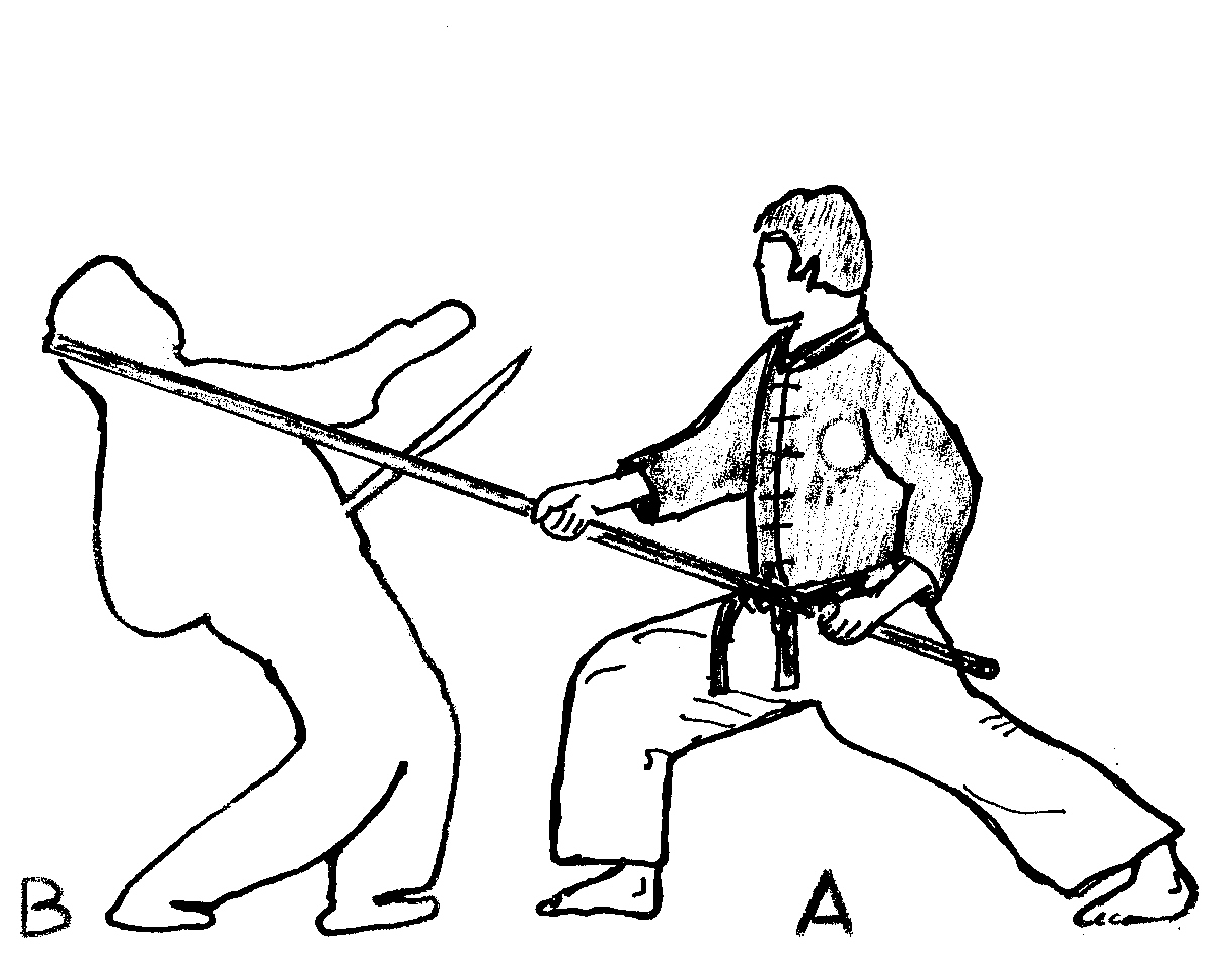 defense_contre_sabre